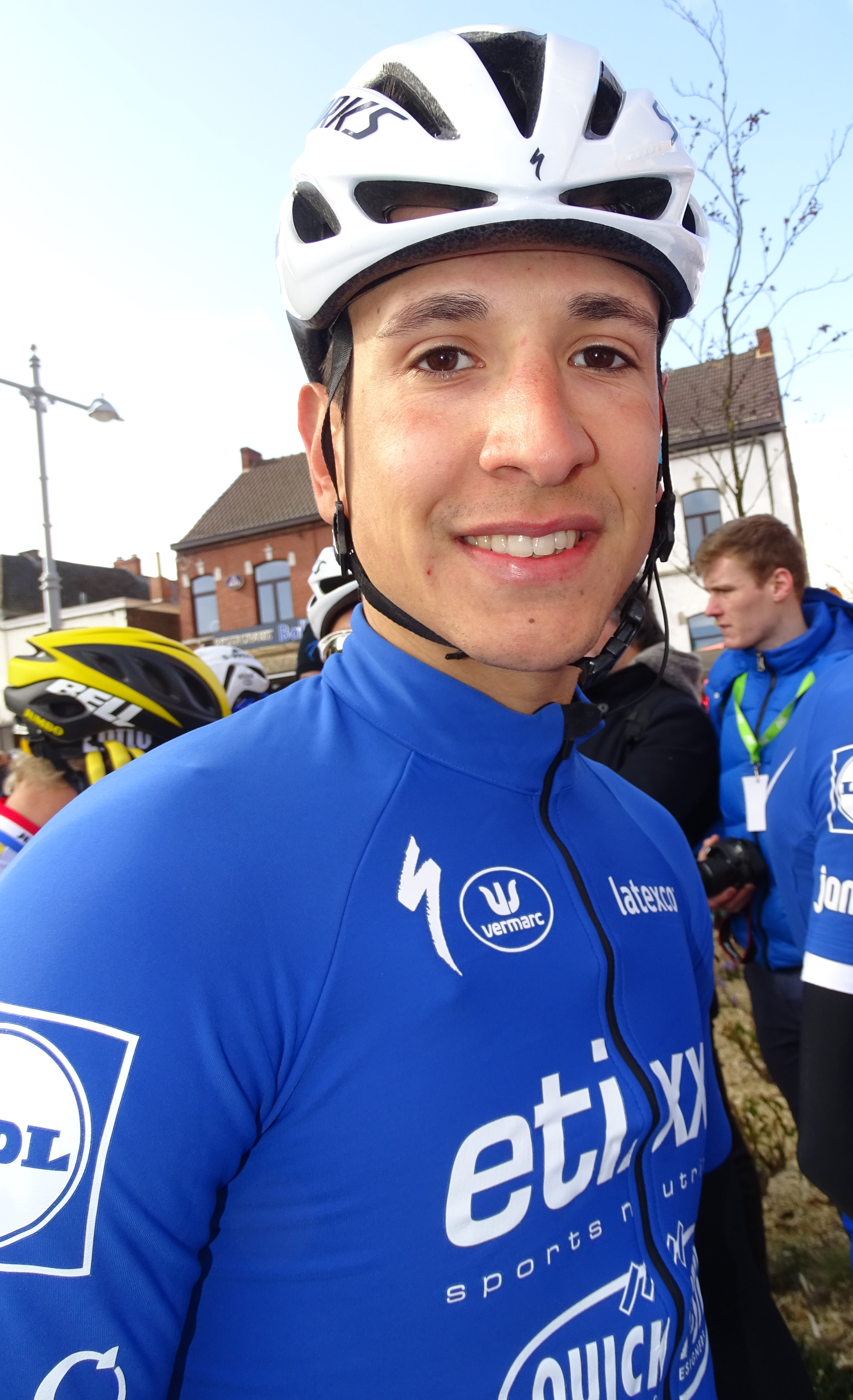 Reportage réalisé le mercredi 2 mars à l'occasion du départ du Samyn des Dames 2016 et du Samyn 2016 à Quaregnon, Belgique.